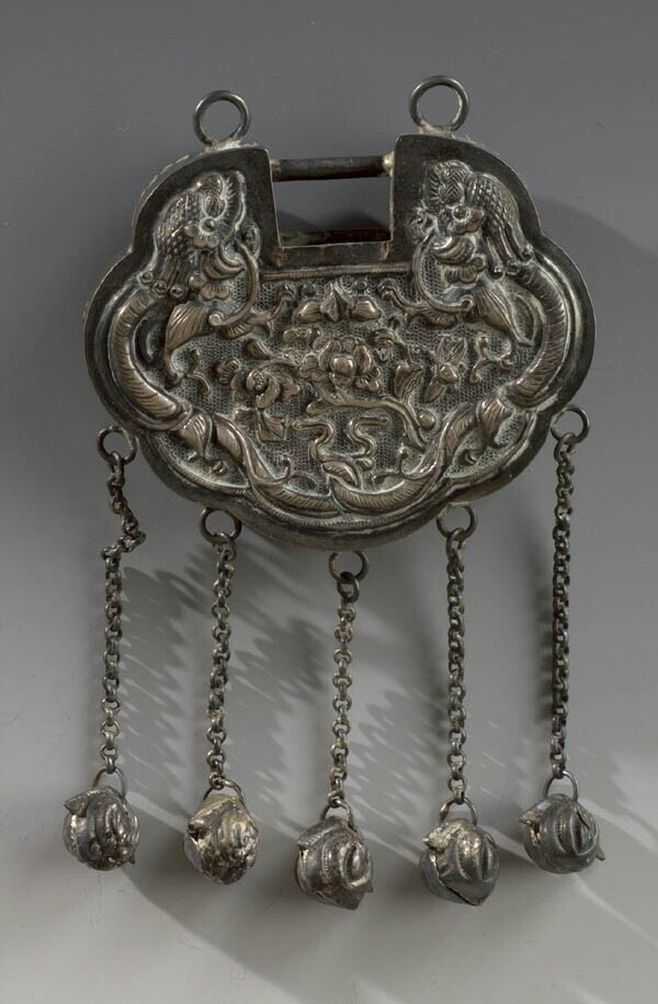 Zilveren amulet in de vorm van een slot. De ene kant is versierd met draken en pioenen, de andere kant met draken en 4 karakters met de tekst Republiek China (1912-1949). Aan de zijkanten zitten openingen in de vorm van geldstukken. Aan de onderkant hangen 5 kettinkjes met bedeltjes eraan (bloemen ?).